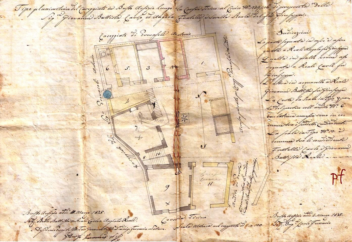 Perizia di divisione immobile